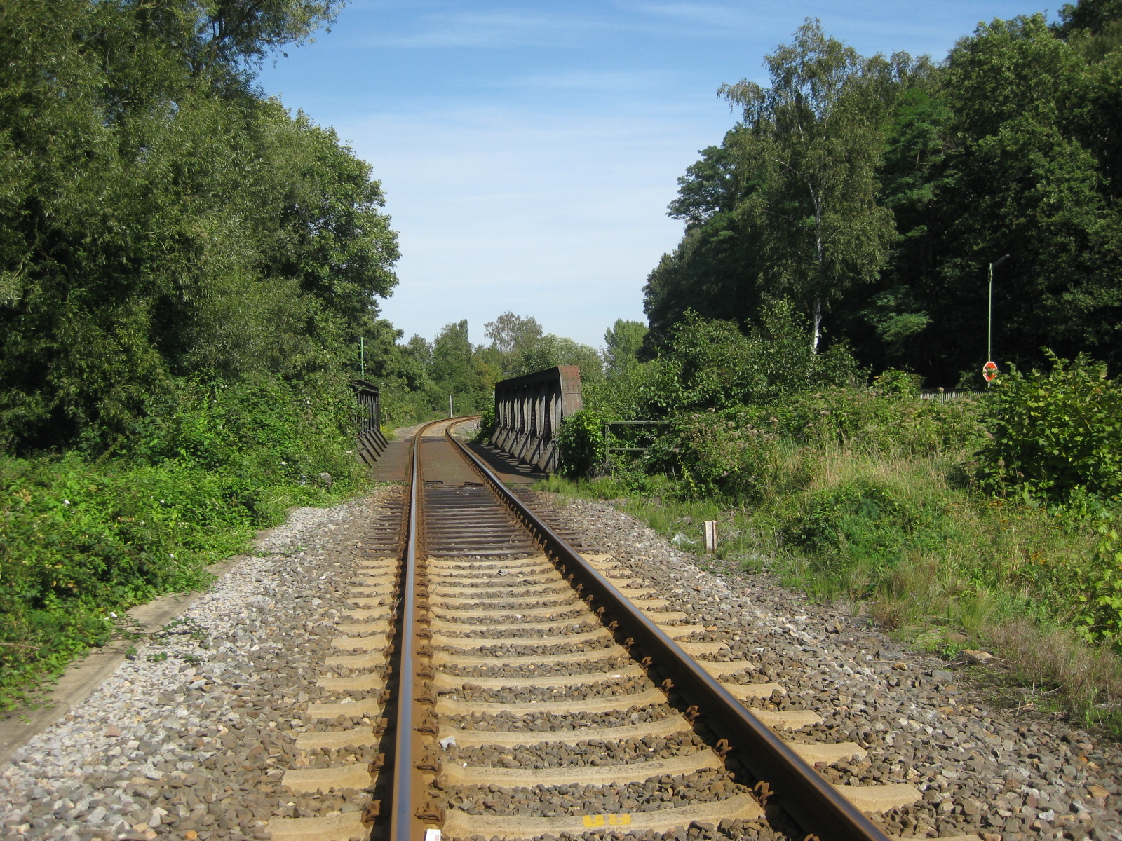 Eisenbahnbrücke über die Inde am ehemaligen Haltepunkt Röhe an der Talbahnlinie, Stadt Eschweiler, Städteregion Aachen, Nordrhein-Westfalen